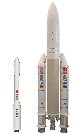 Vega et Ariane 5 cote à cote Unknown